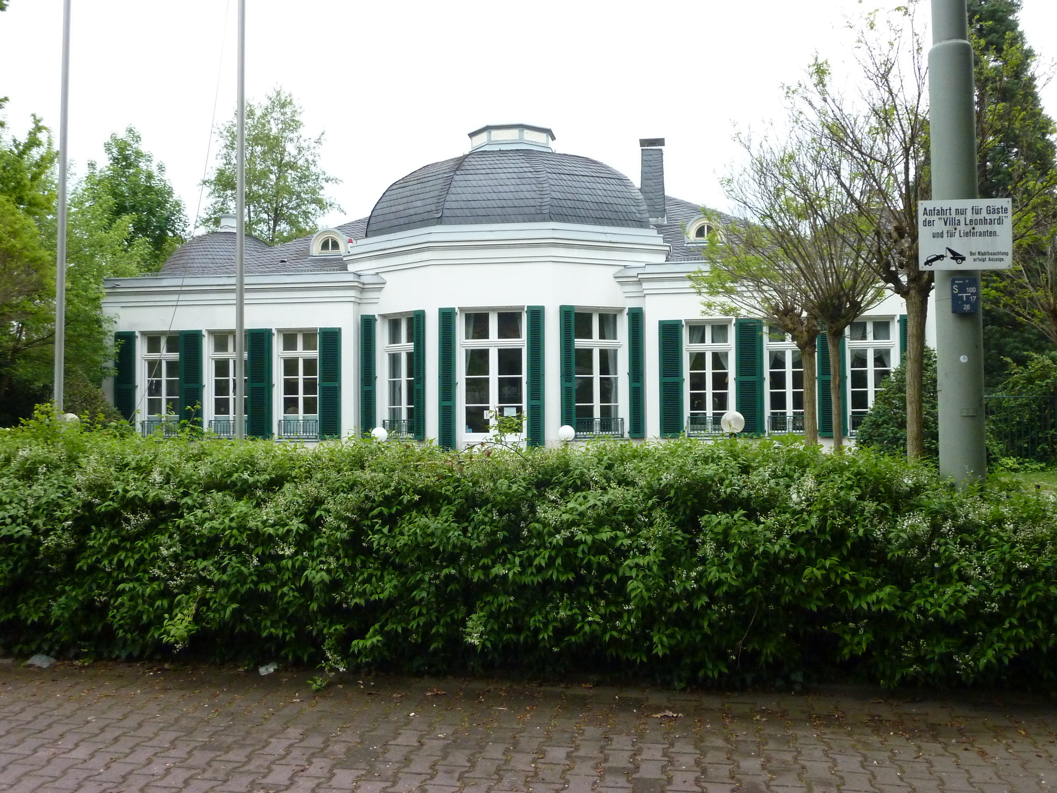 Mittelpavillon (Westfassade) der 1806 von Nicolas Alexandre Salins de Montfort entworfenen Villa Leonhardi, gelegen am Westrand des Palmengartens im Stadtteil Westend-Nord in Frankfurt am Main. Ansicht von der Zeppelinallee aus